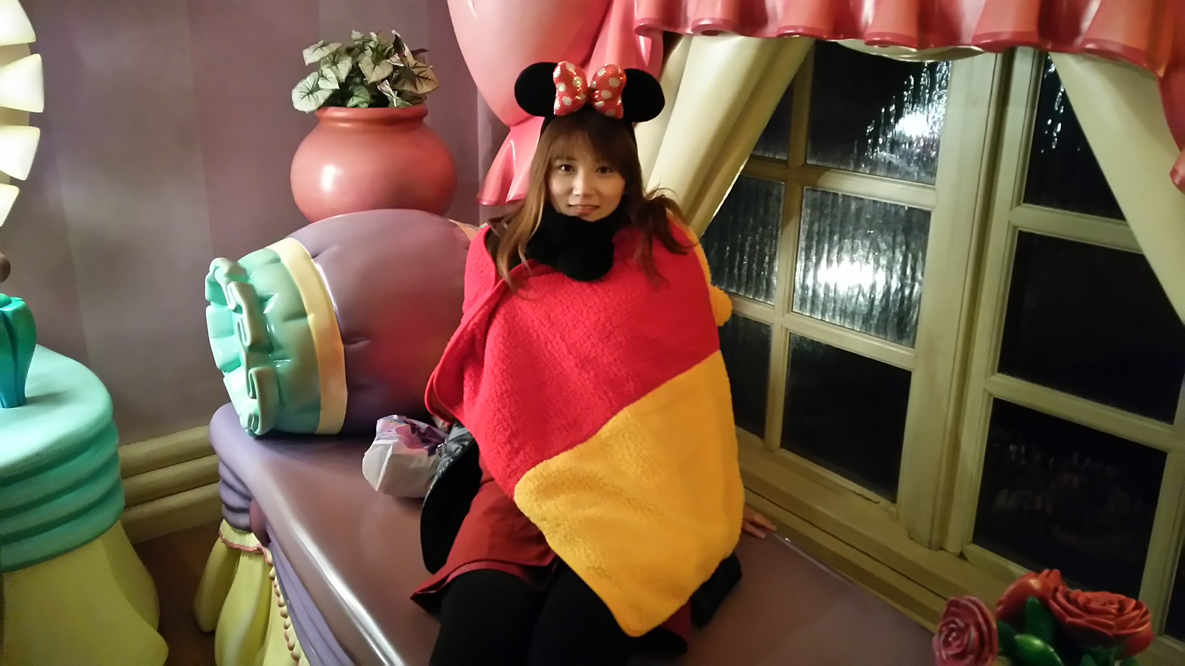 山下晴奈